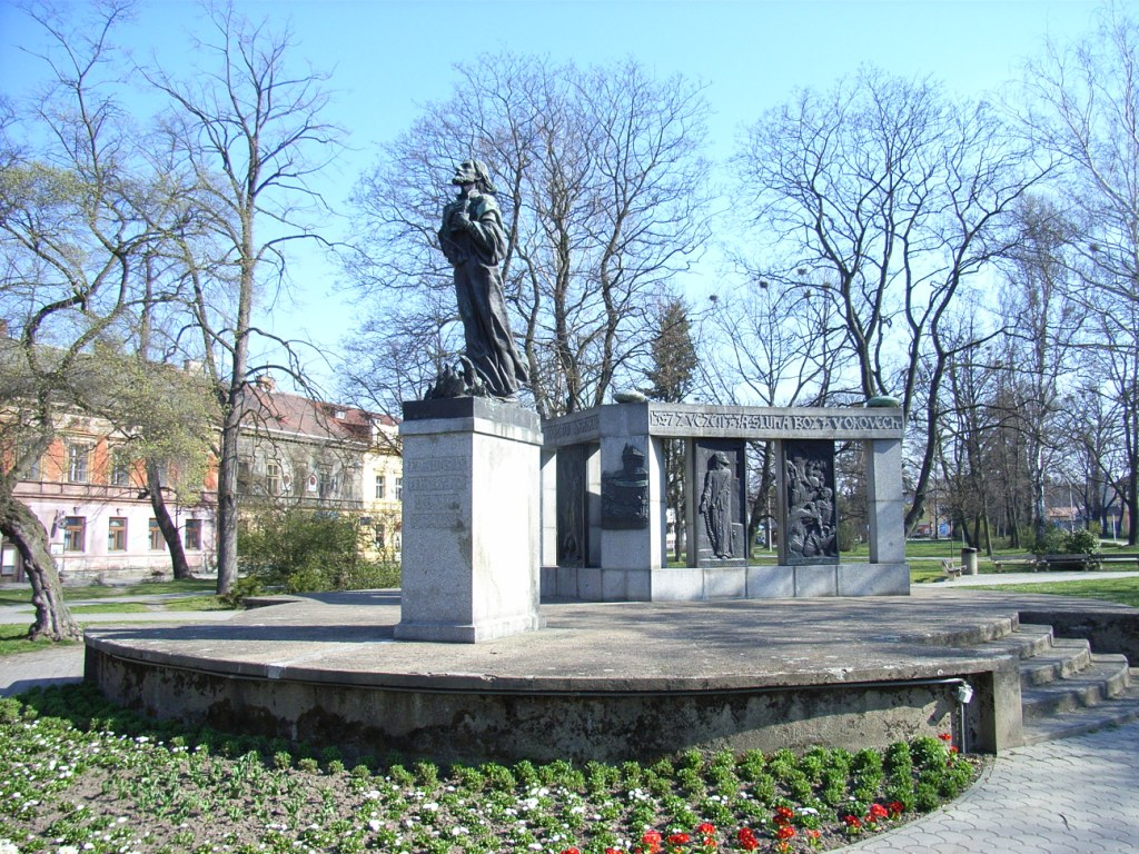 Foto sochařské kompozice „Mistr Jan Hus“ - Husovy sady v Táboře